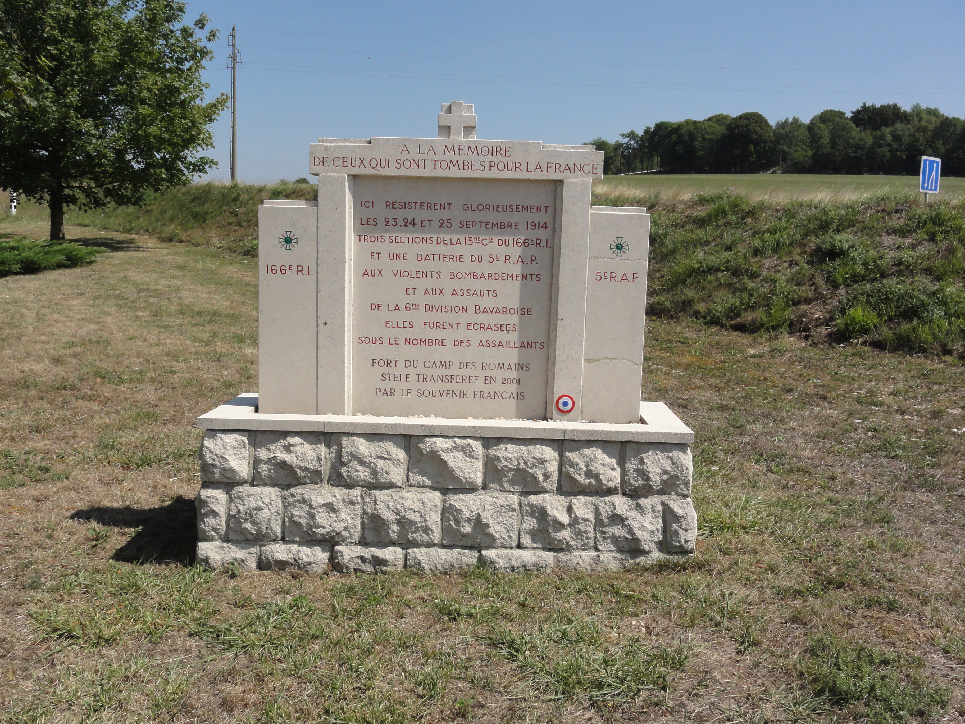 Saint-Mihiel (Meuse) memorial du Saillant de Saint-Mihiel